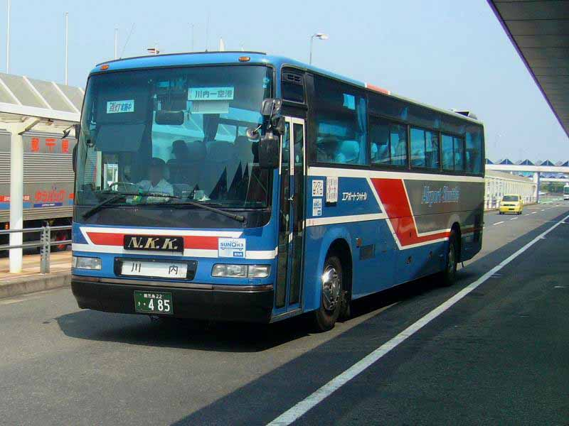 登録番号：鹿児島22き・485 南国交通所属